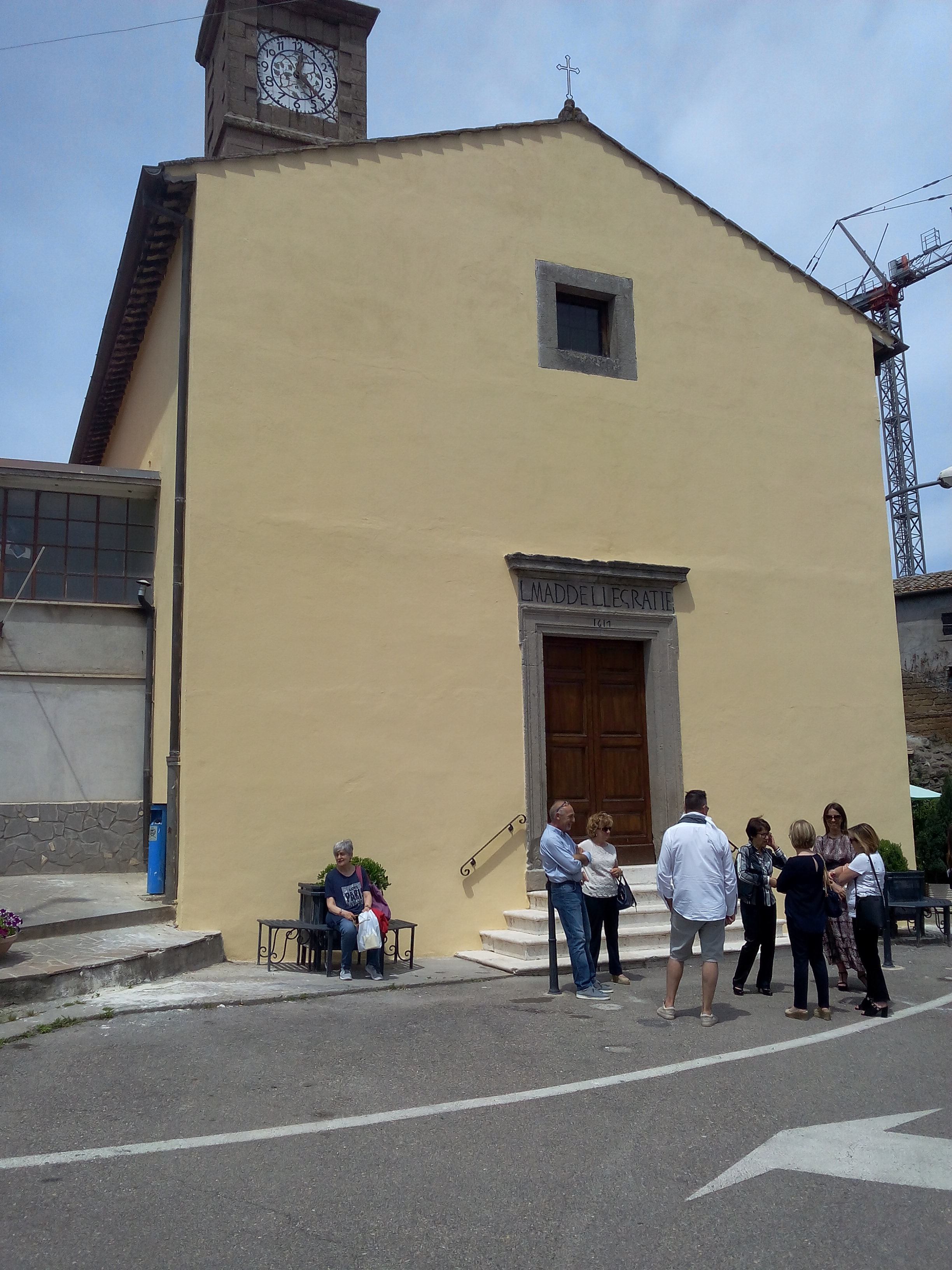 27 maggio 2018, Chia, Piazza Garibaldi, Chiesa Santa Maria delle Grazie